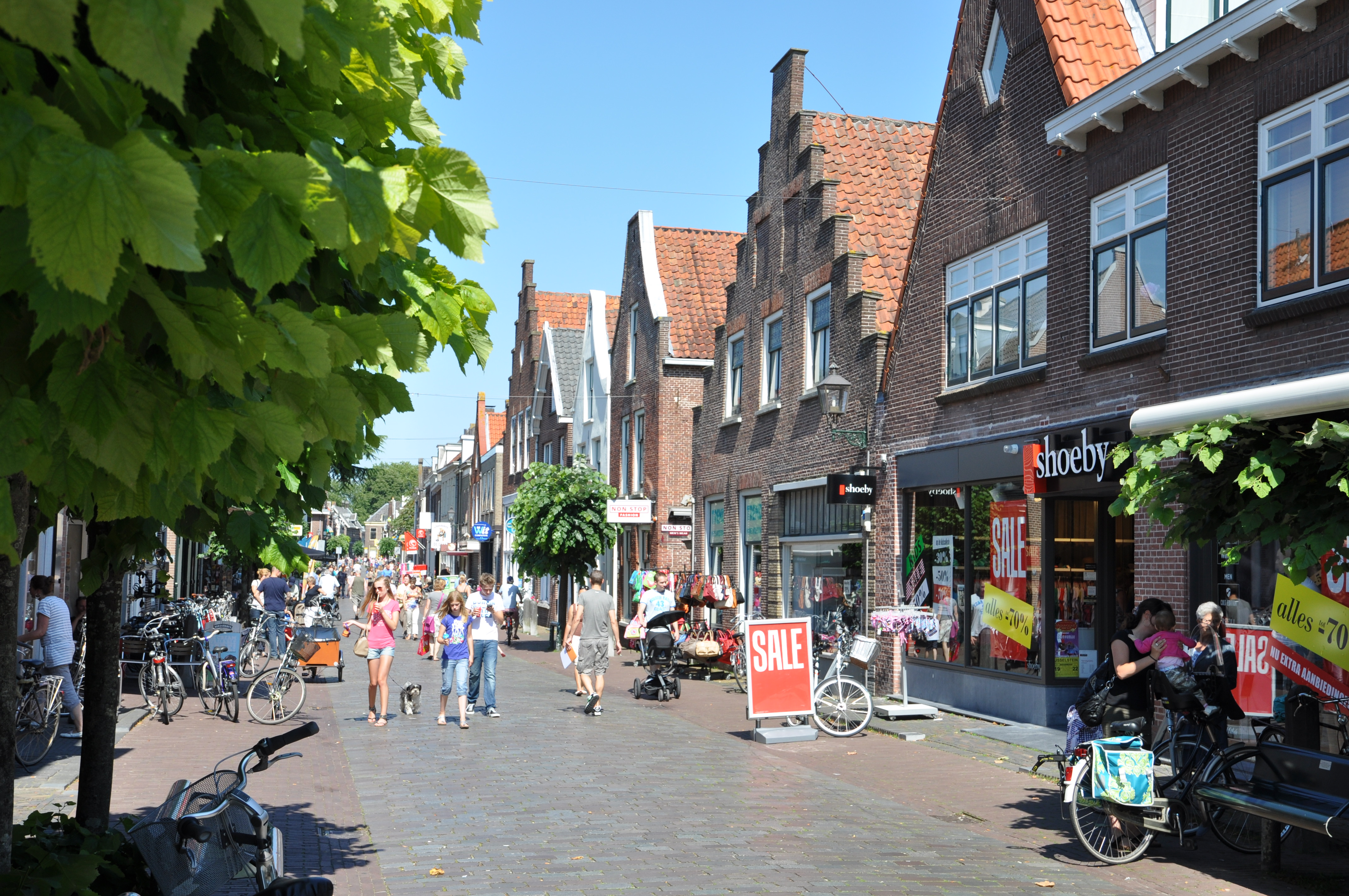 Zicht op winkels in IJsselstein